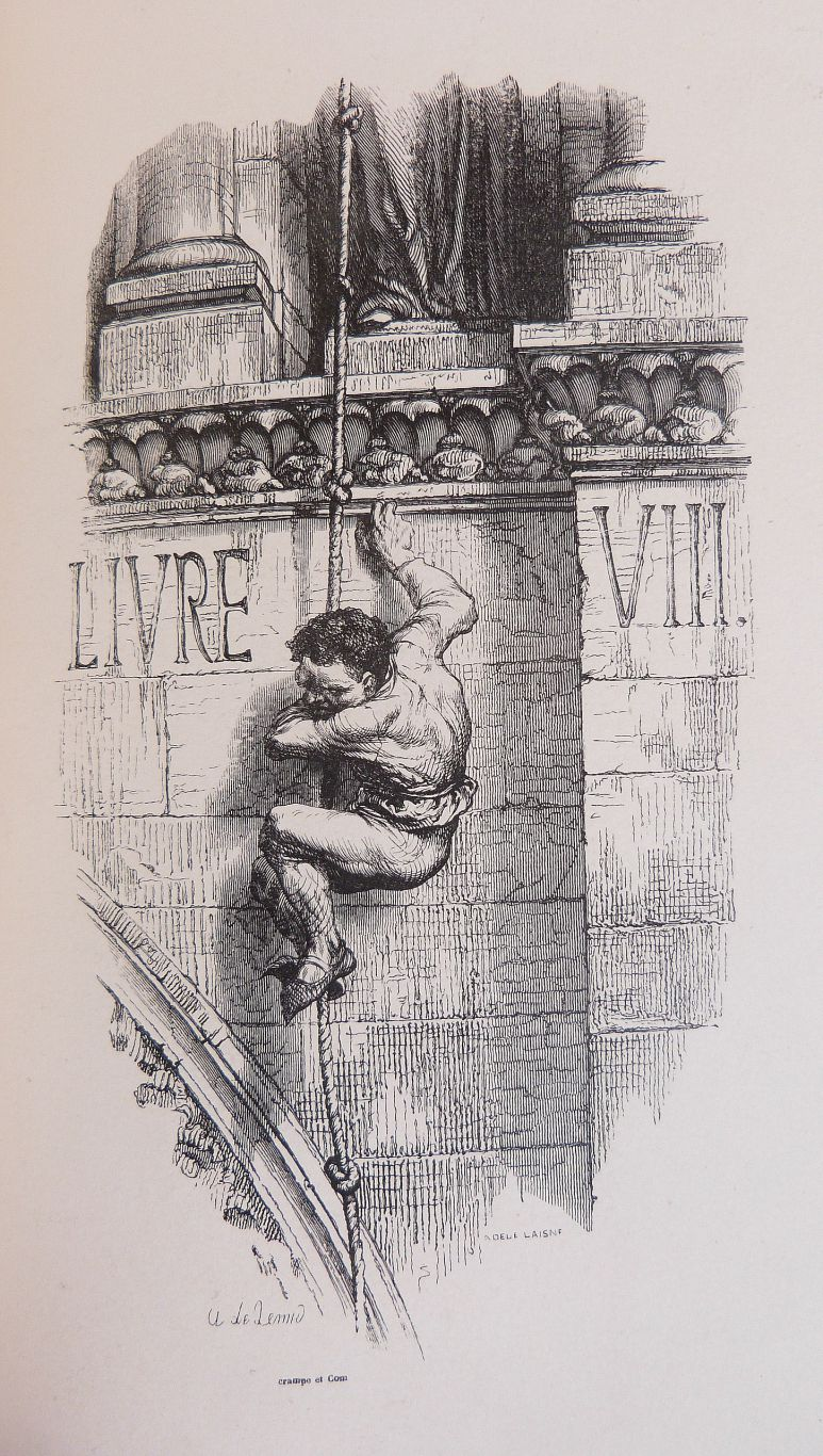 Livre VIII, gravure d'Adèle Laisné d'après un dessin d'Aimé de Lemud pour illustrer Notre-Dame de Paris de Victor Hugo, Paris, Perrotin, Garnier frères, 1844, Grand in-8, relié, 485 p. Édition illustrée de 55 planches hors texte, dont 21 gravées sur acier et 34 sur bois, d'après les dessins de M.M. de Beaumont, L. Boulanger, Daubigny, T. Johannot, de Lemud, Meissonnier, Roqueplan, de Rudder, Steinheil [1].